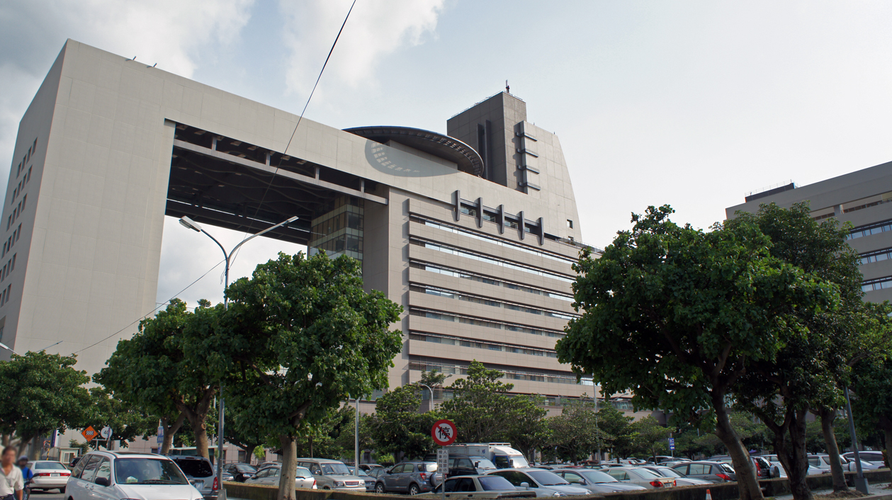 中國醫藥大學附設醫院急重症中心大樓。